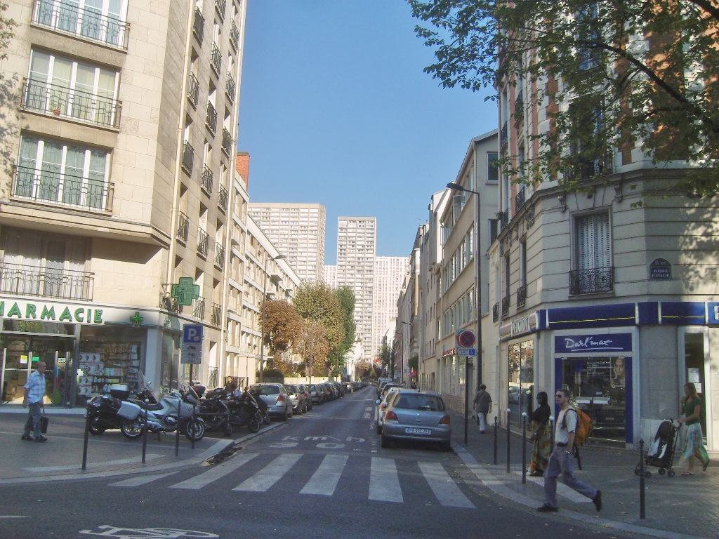 Paris 13e arrondissement - Rue de la Vistule - vue est à hauteur de l'avenue d'Italie